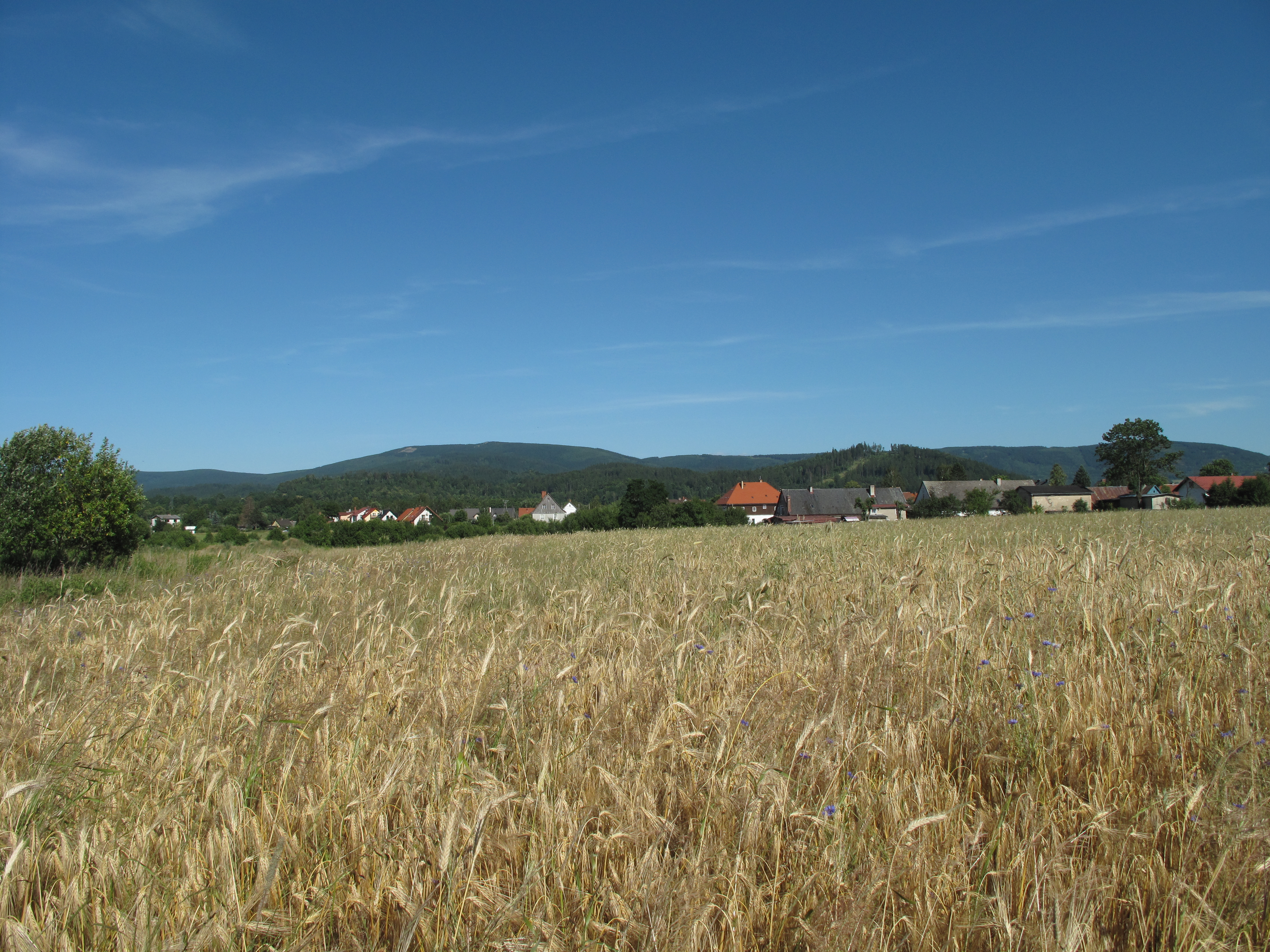 Kostrzyca (województwo dolnośląskie). Polska.